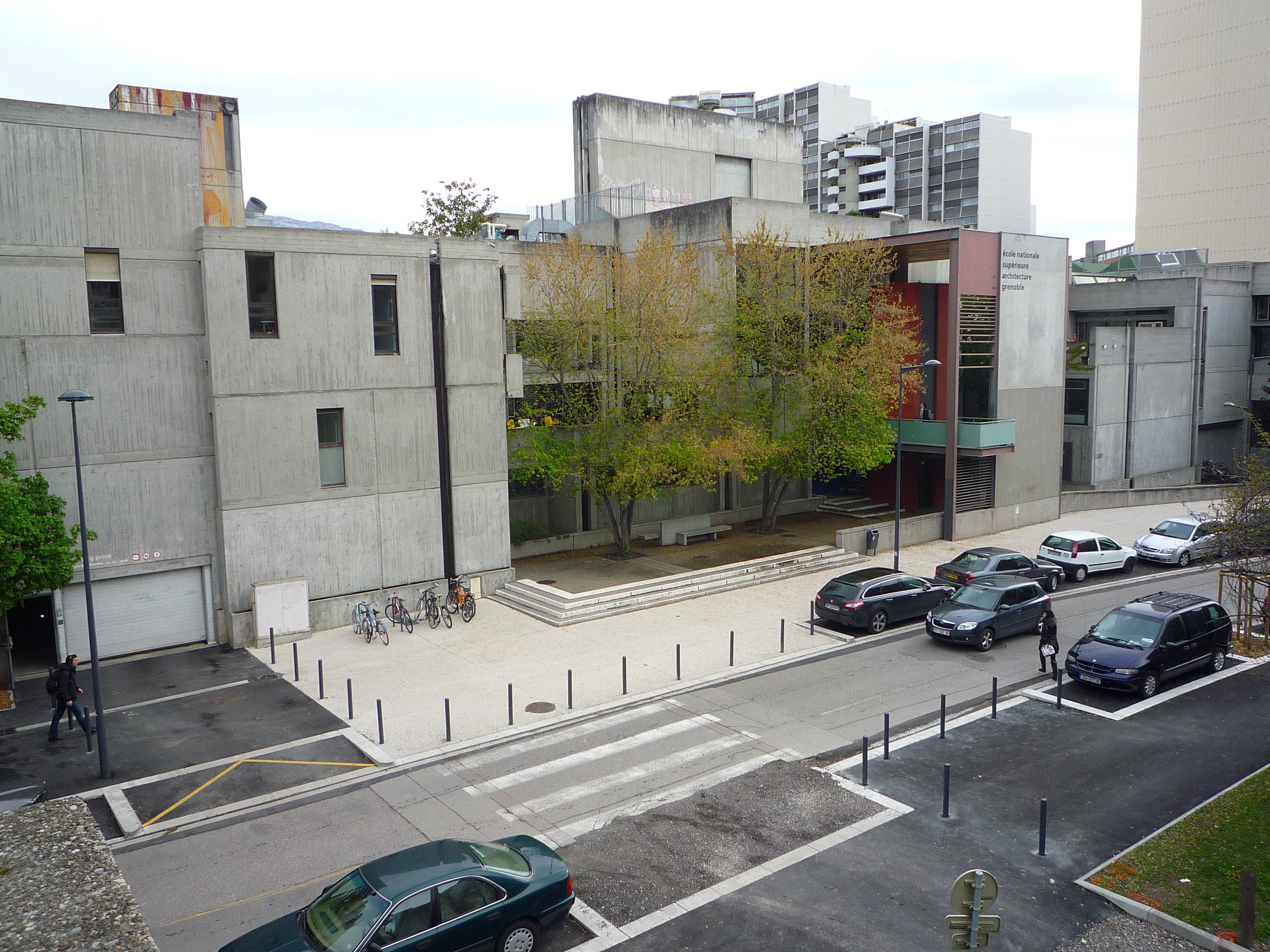 Avenue de Constantine - Grenoble